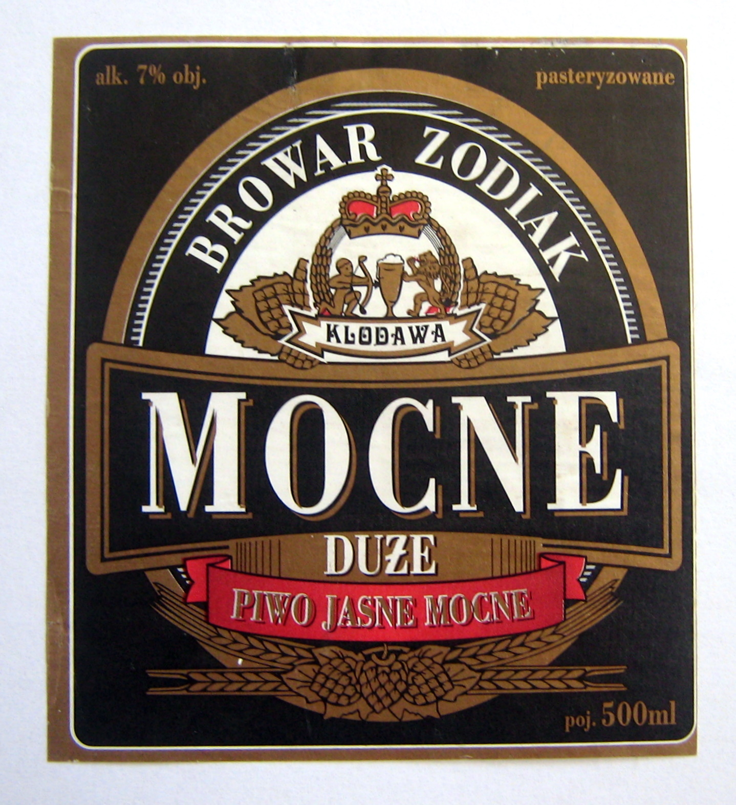 Etykieta z piwa Mocne Duże browaru Zodiak